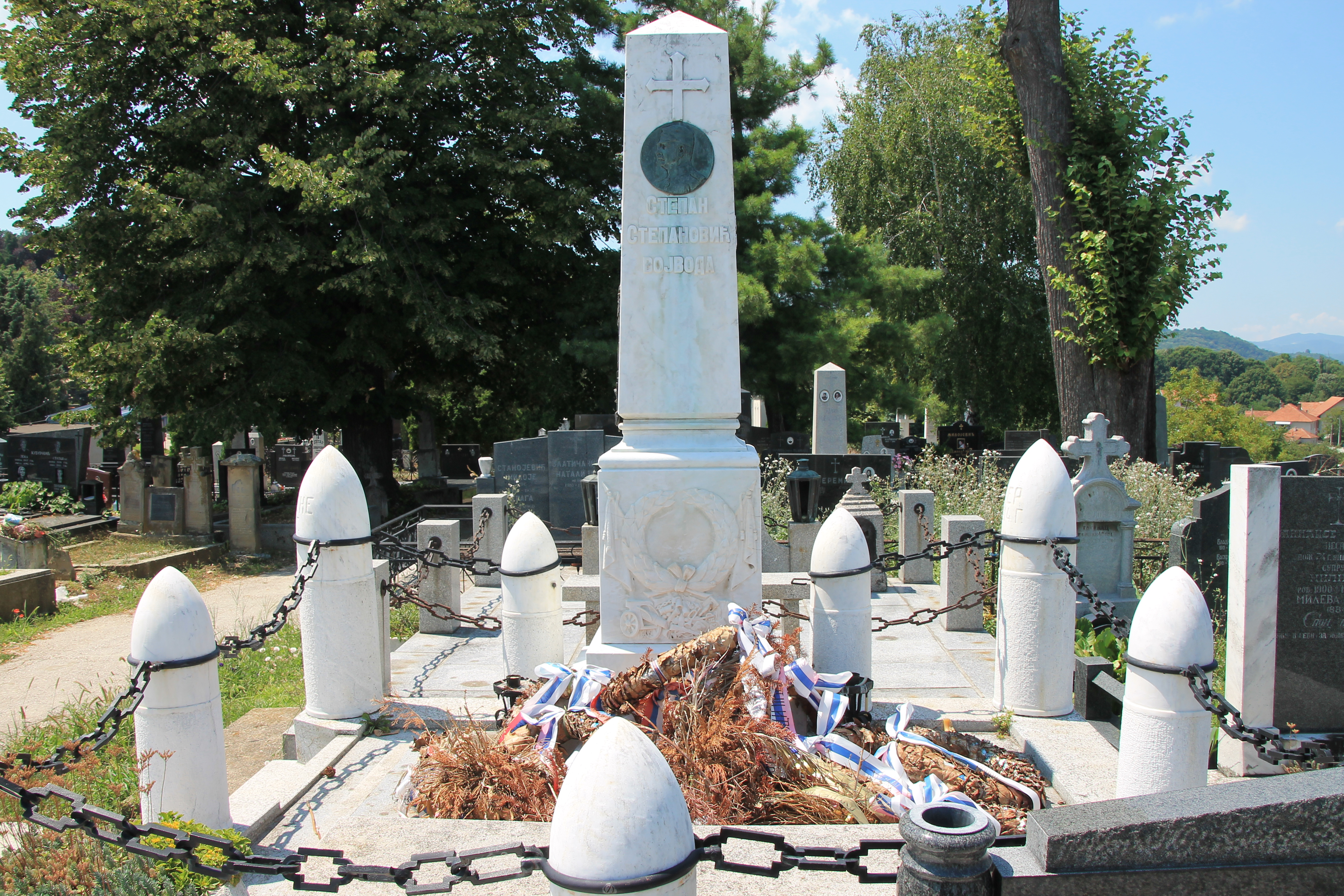 Grob Stepe Stepanovića